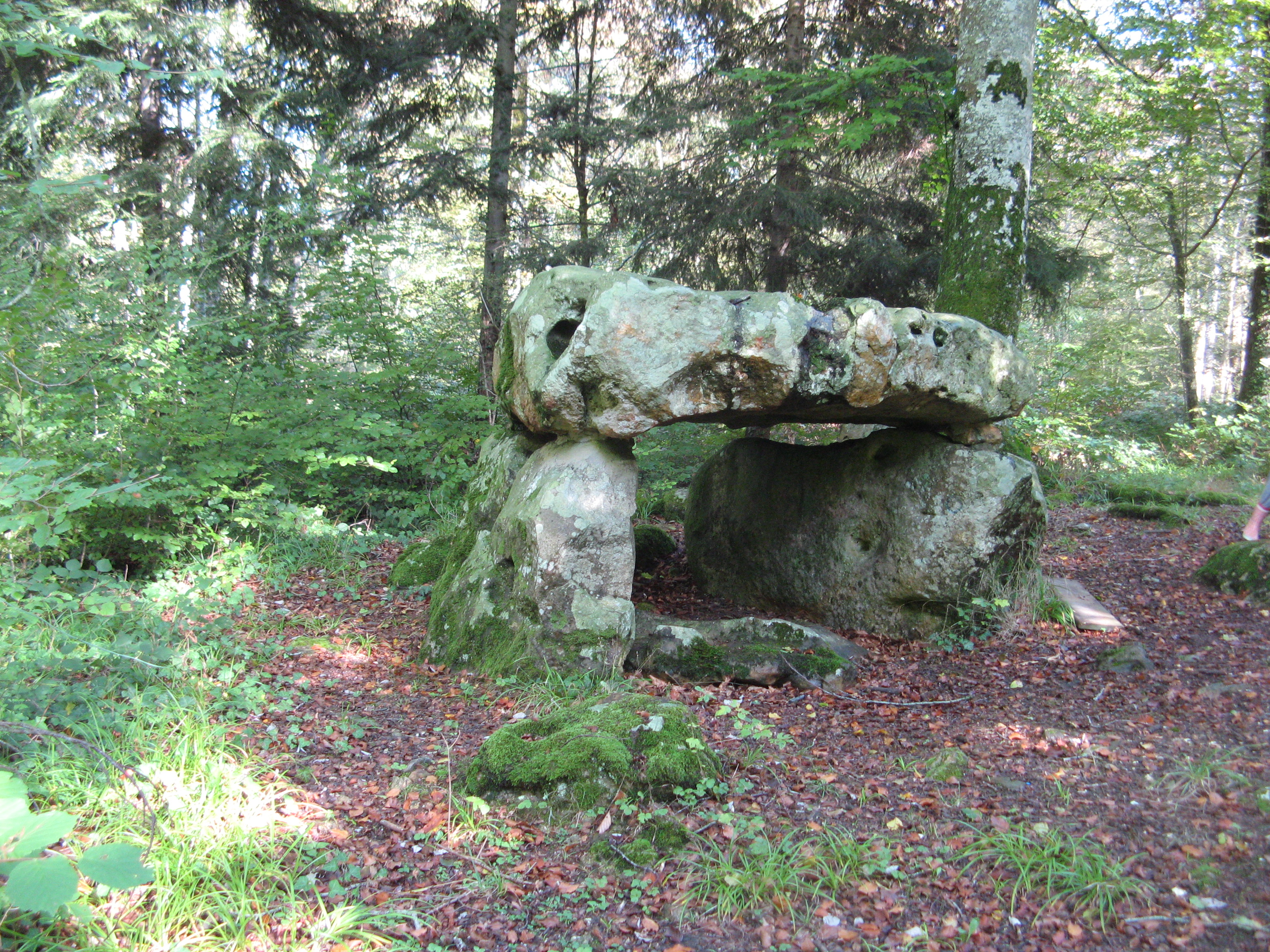 Saint-Maurice-aux-Riches-Hommes : dolmen de Langy .